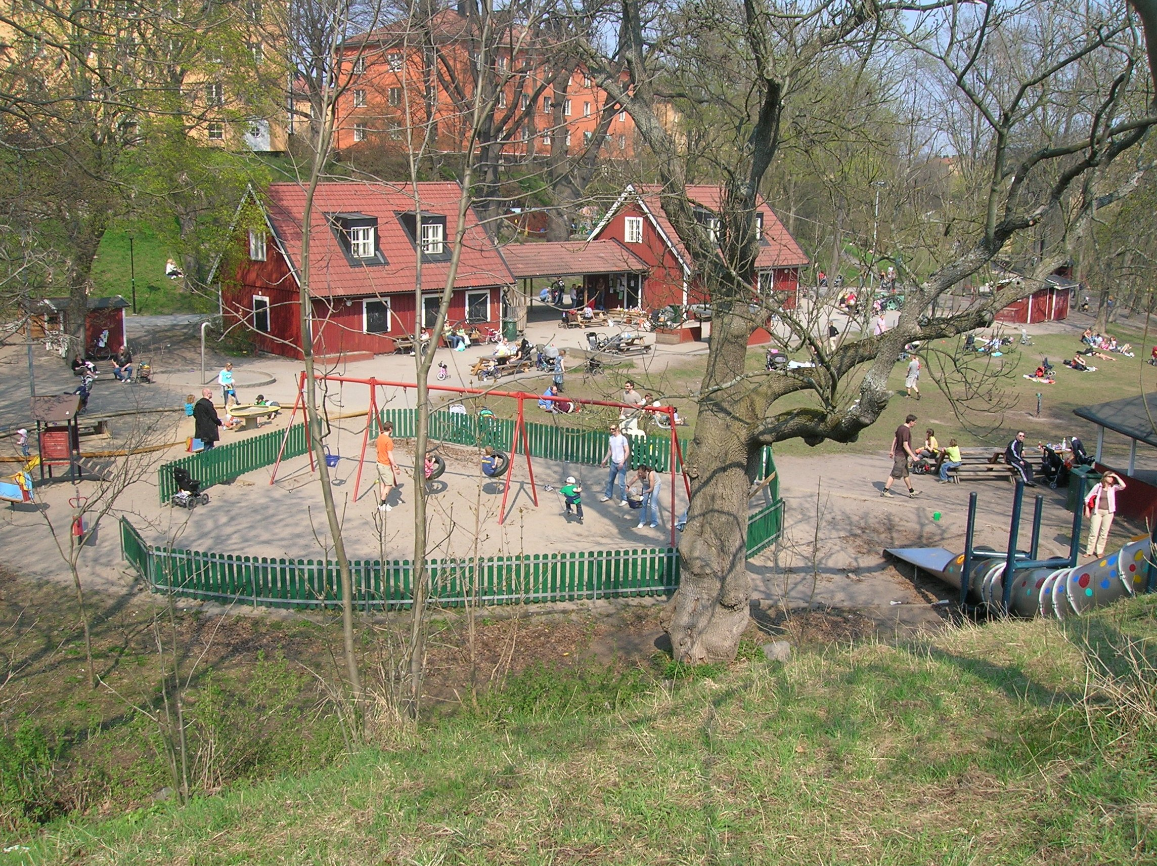 Stora Blecktornsparken, Stockholm, Sweden